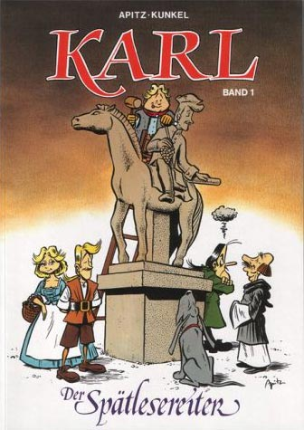 Karl – Der Spätlesereiter, Cover Bd. 1